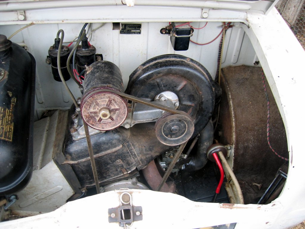 Vespa 400 engine.